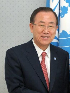 Пан Ги Мун и Владимир Путин. (обрезанная версия)